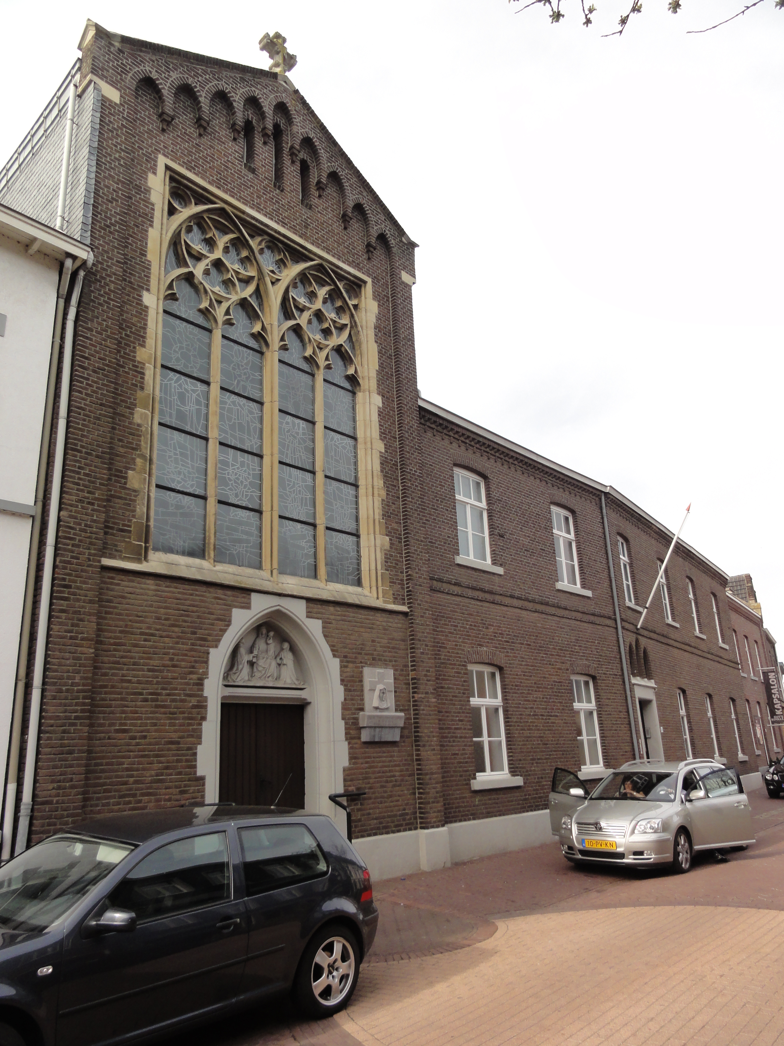 Echt (Limburg)